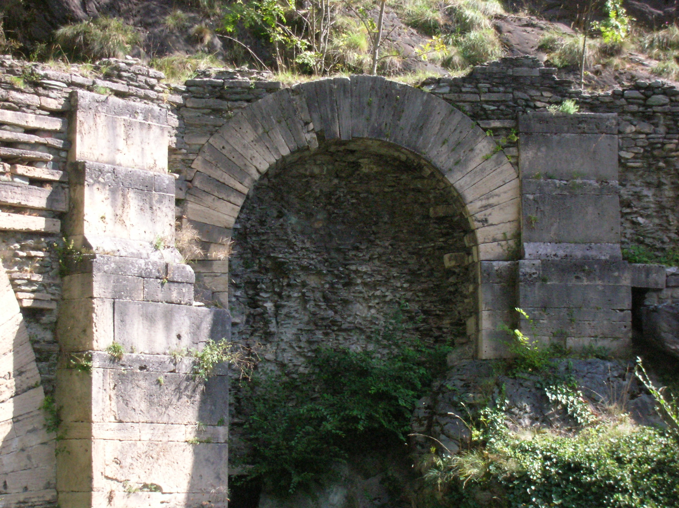 Ponte Romano sulla Via delle Gallie, Saint-Vincent, Valle d'Aosta, Italia. This is a photo of a monument which is part of cultural heritage of Italy.